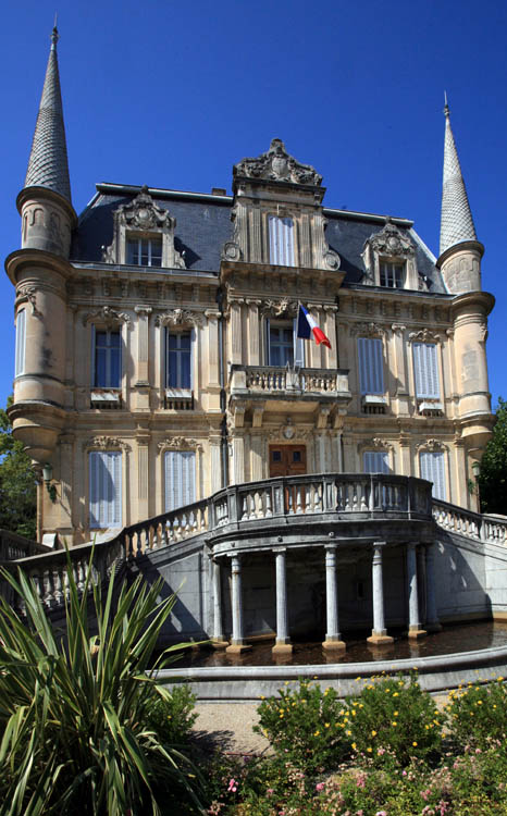 Château de Val-Seille - the village of Courthézon, Vaucluse, France